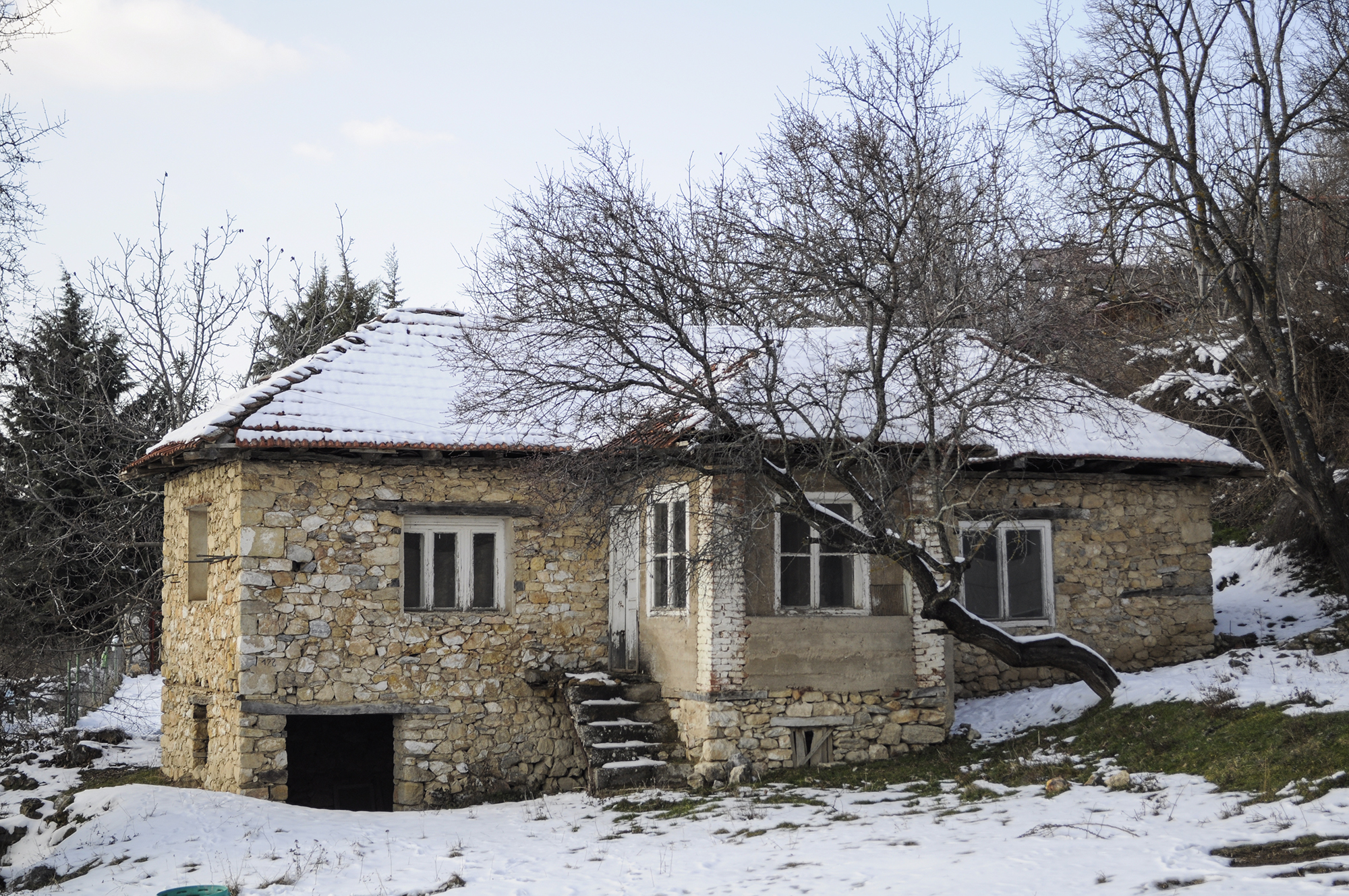 Куќа со стара архитектура во Долно Соње.